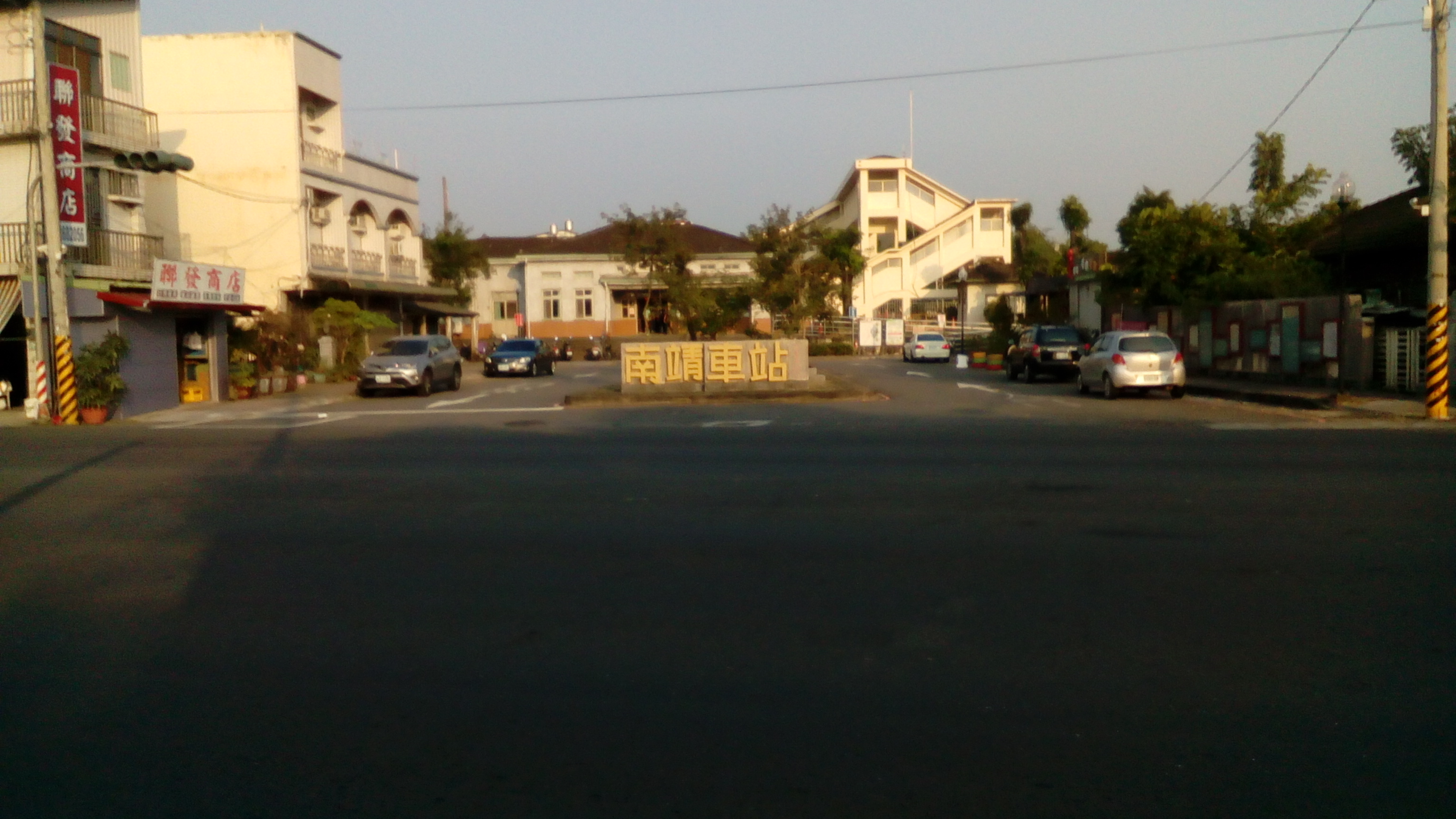 同上